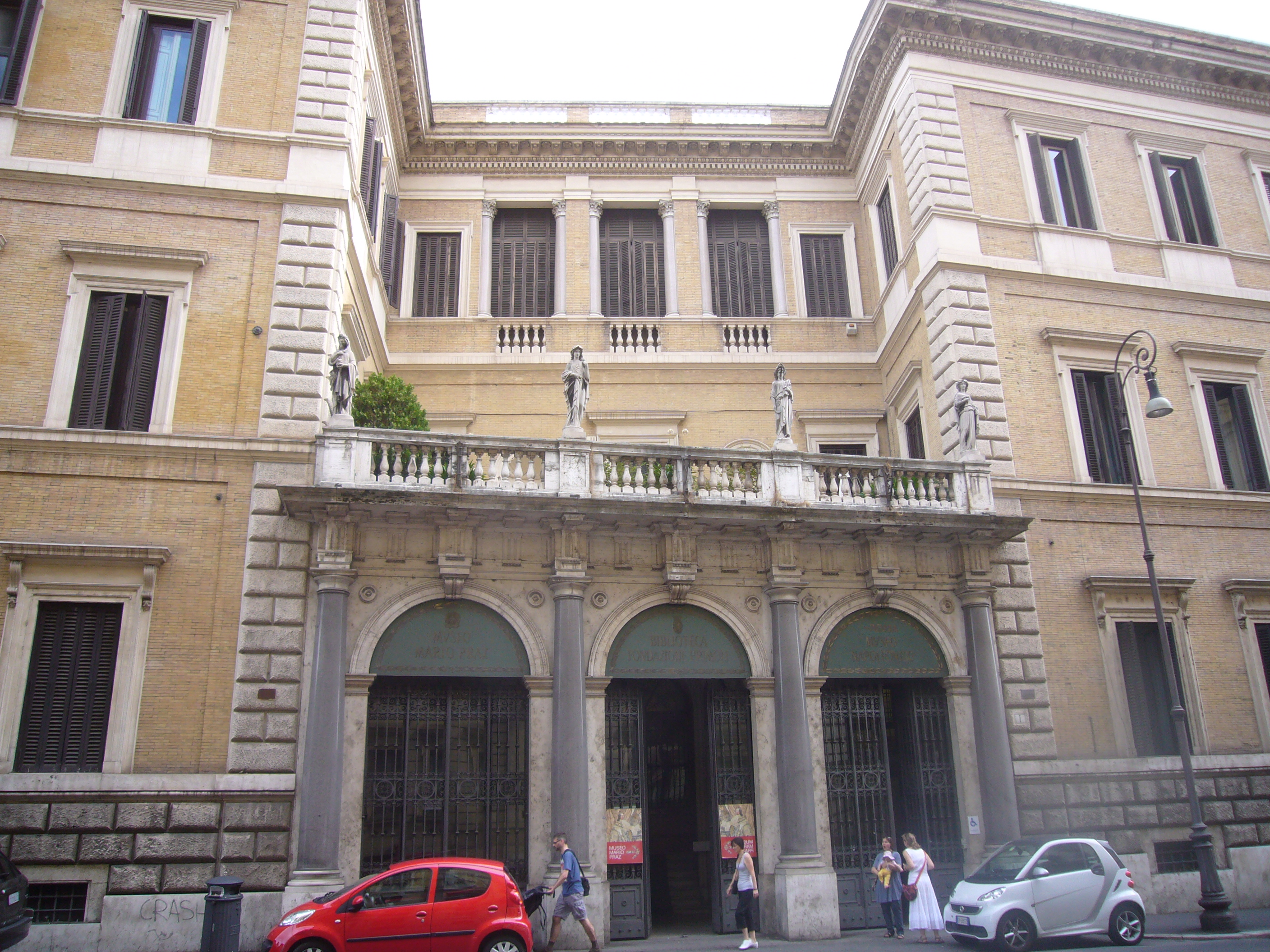 Roma, Palazzo Primoli, Museo Mario Praz.